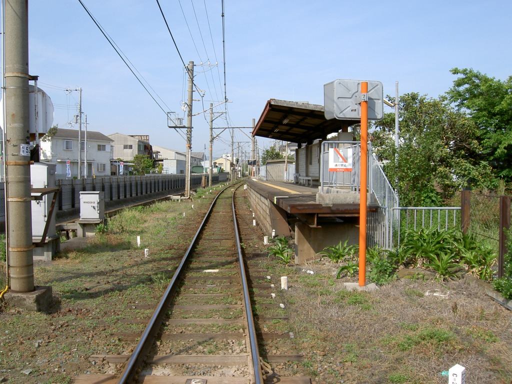 築港町駅全景。2005年5月21日、駅脇の踏切より撮影。